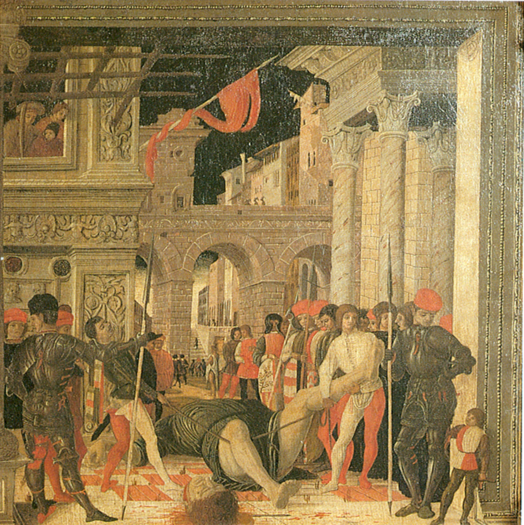 copy